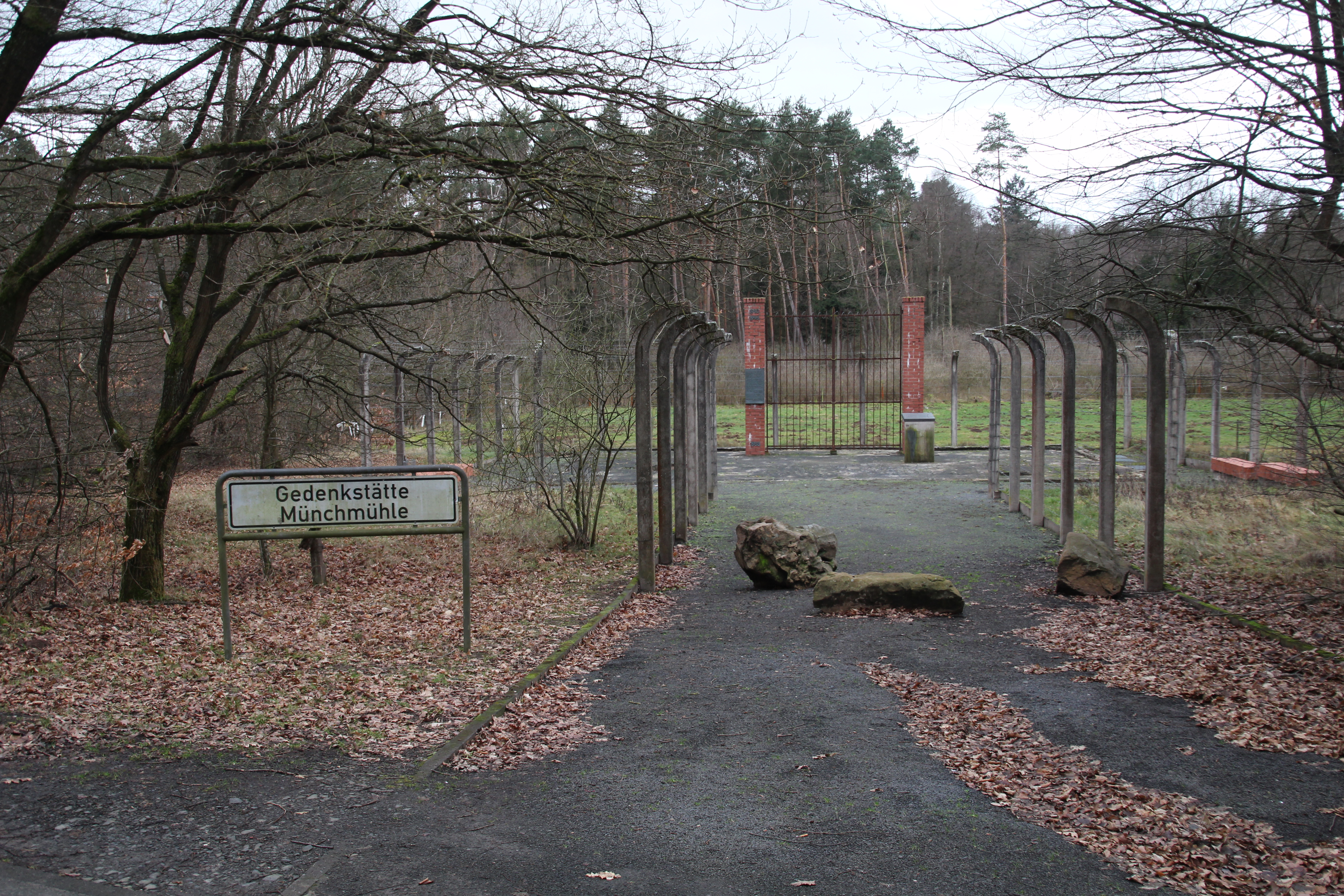 KZ-Außenlager Münchmühle